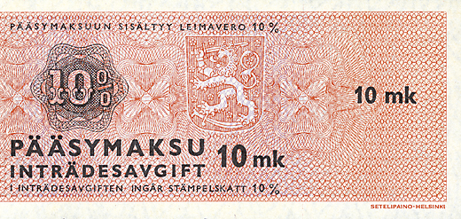 Huviverollinen pääsylippu, 10 mk, josta veroa 10%